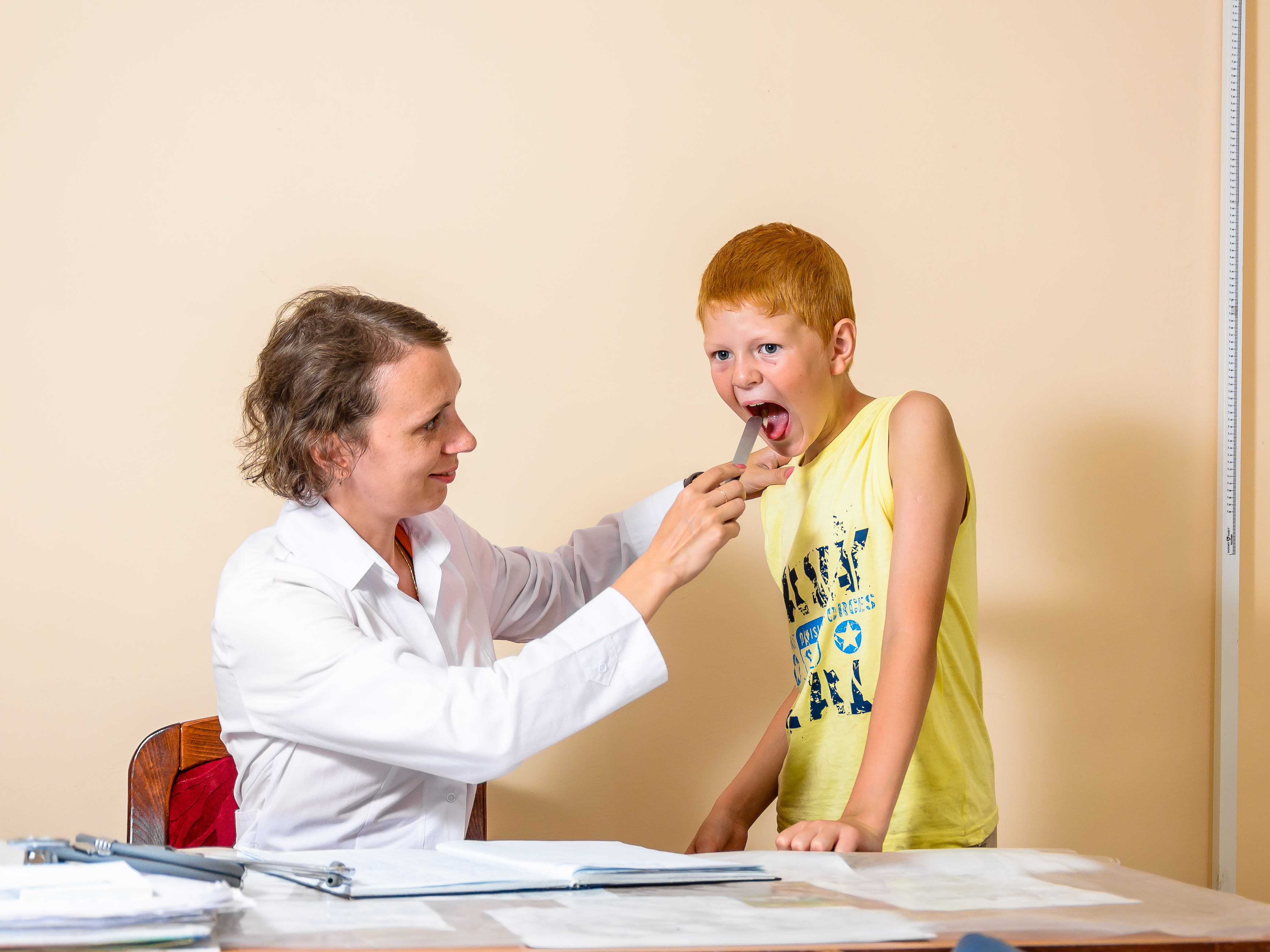 Мидики